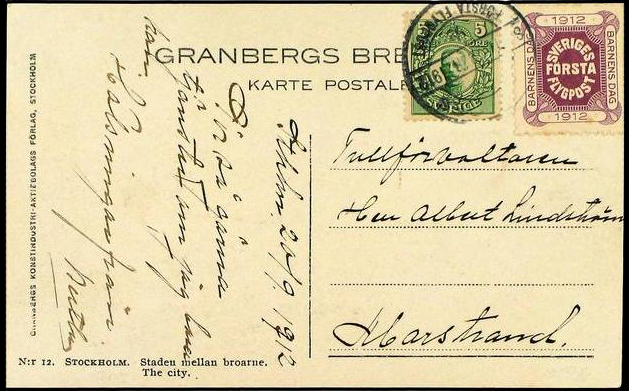 Почтовая карточка, оплаченная полуофициальной авиапочтовой маркой Швеции, 1912 год